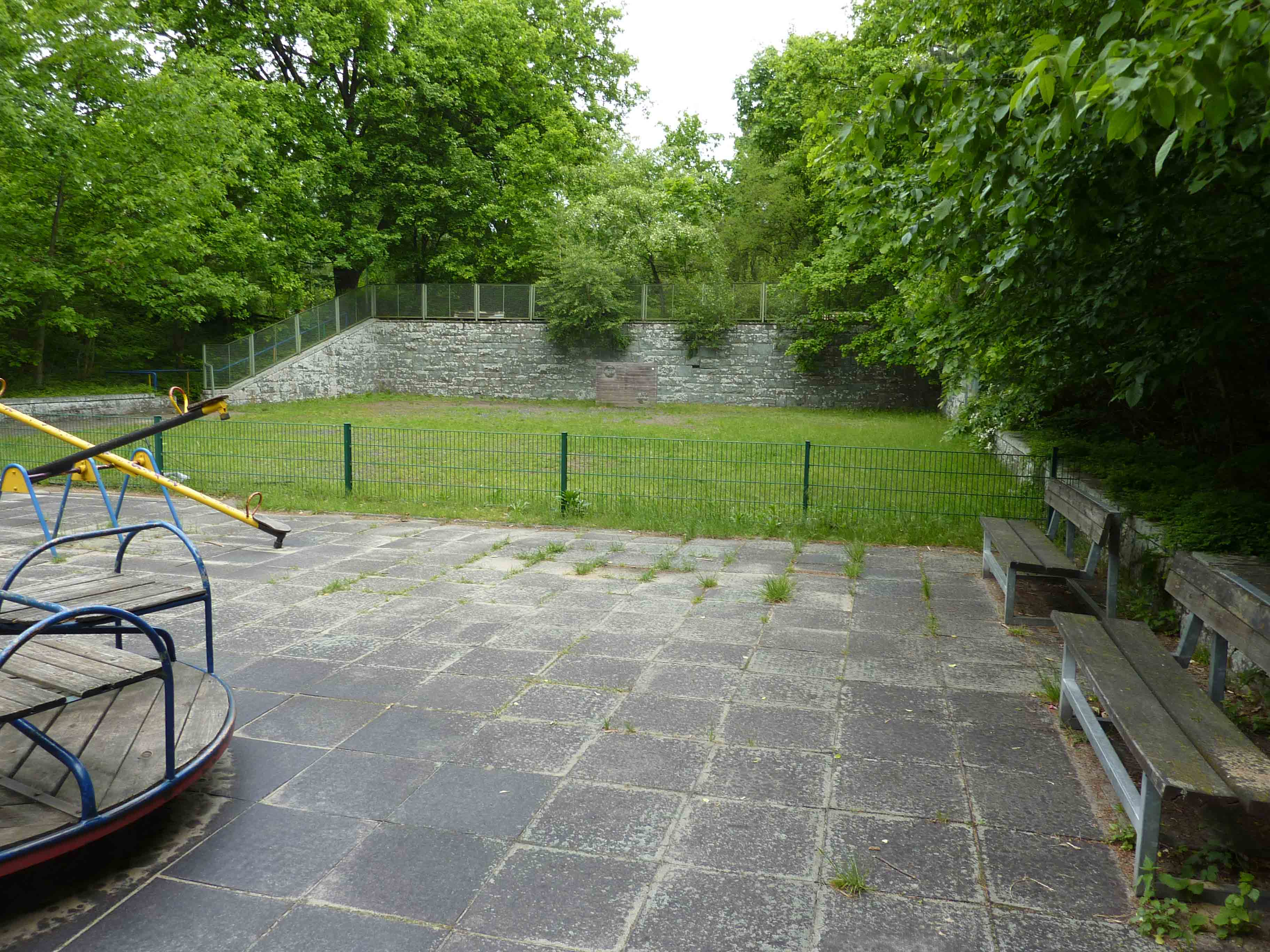 Basketball Olympiade 1936 Berlin Stadion Arena